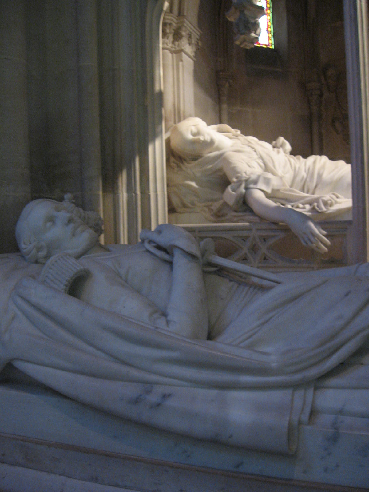 Gisants de Ferdinand-Philippe d'Orléans (1814-1842) et de son épouse Hélène de Mecklembourg-Schwerin (1814-1858), duc et duchesse d'Orléans.